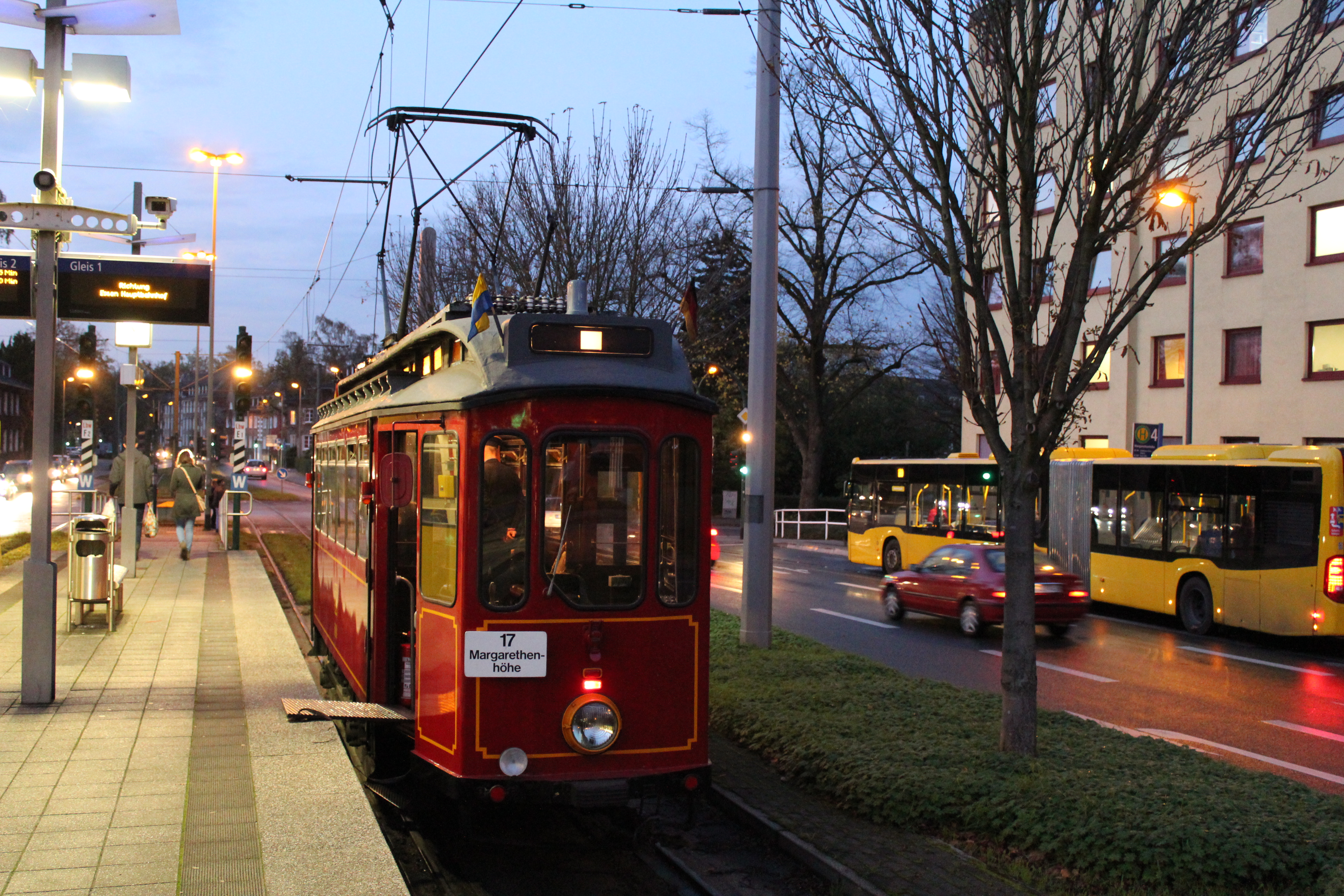 Tw 500 steht in der Station Margarethenhöhe anlässlich der Sonderfahrten zum Jubiläum 40 Jahre U-Bahn in Essen